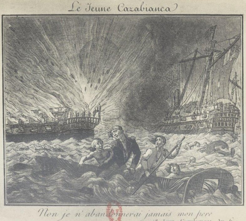 Le fils du commandant Casabianca essayant de sauver son père, commandant du vaisseau l'Orient en flammes à la bataille d'Aboukir en 1798.